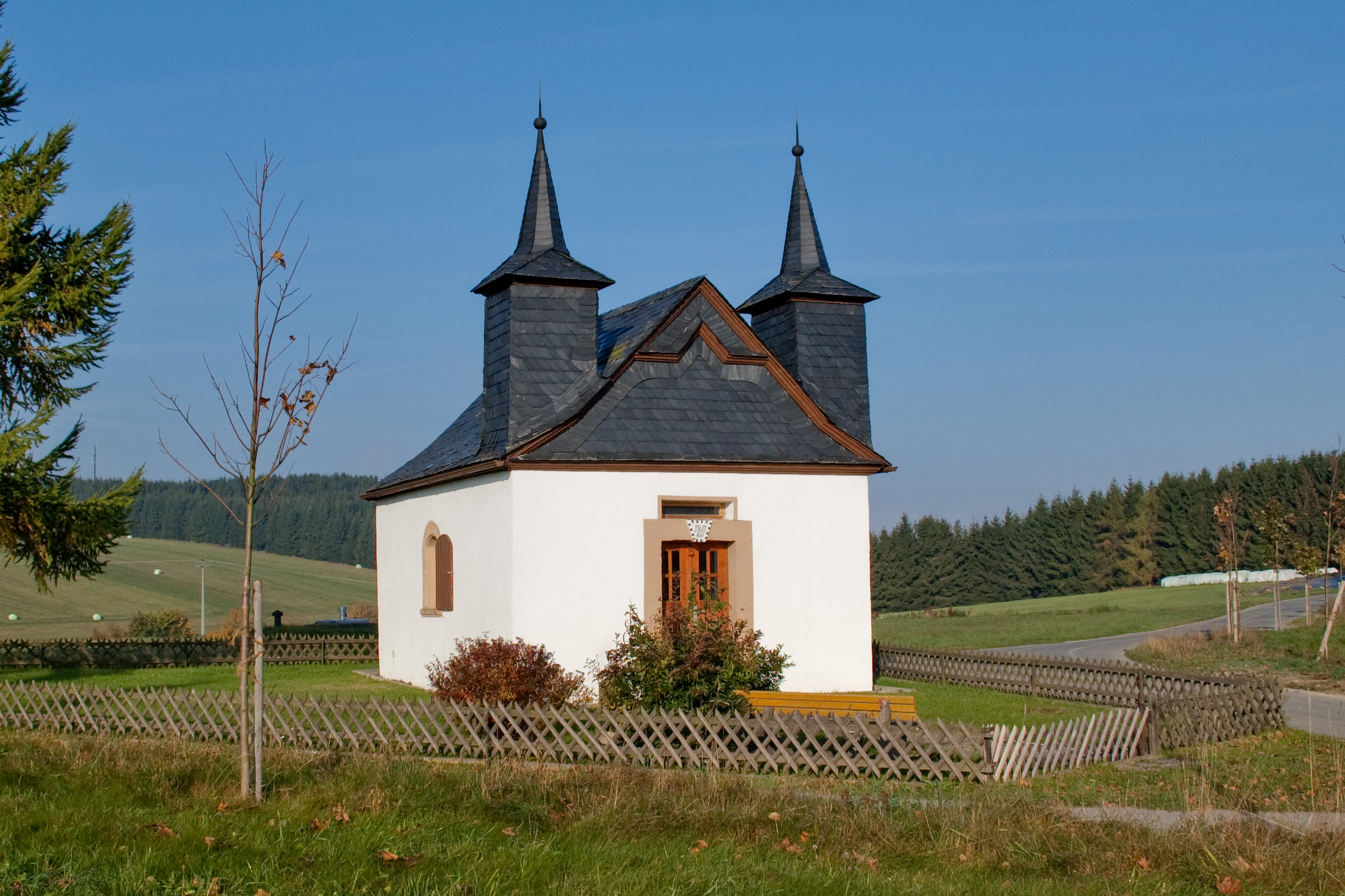 Feldkapelle St. Mariae in Reichenbach (Oberfranken).